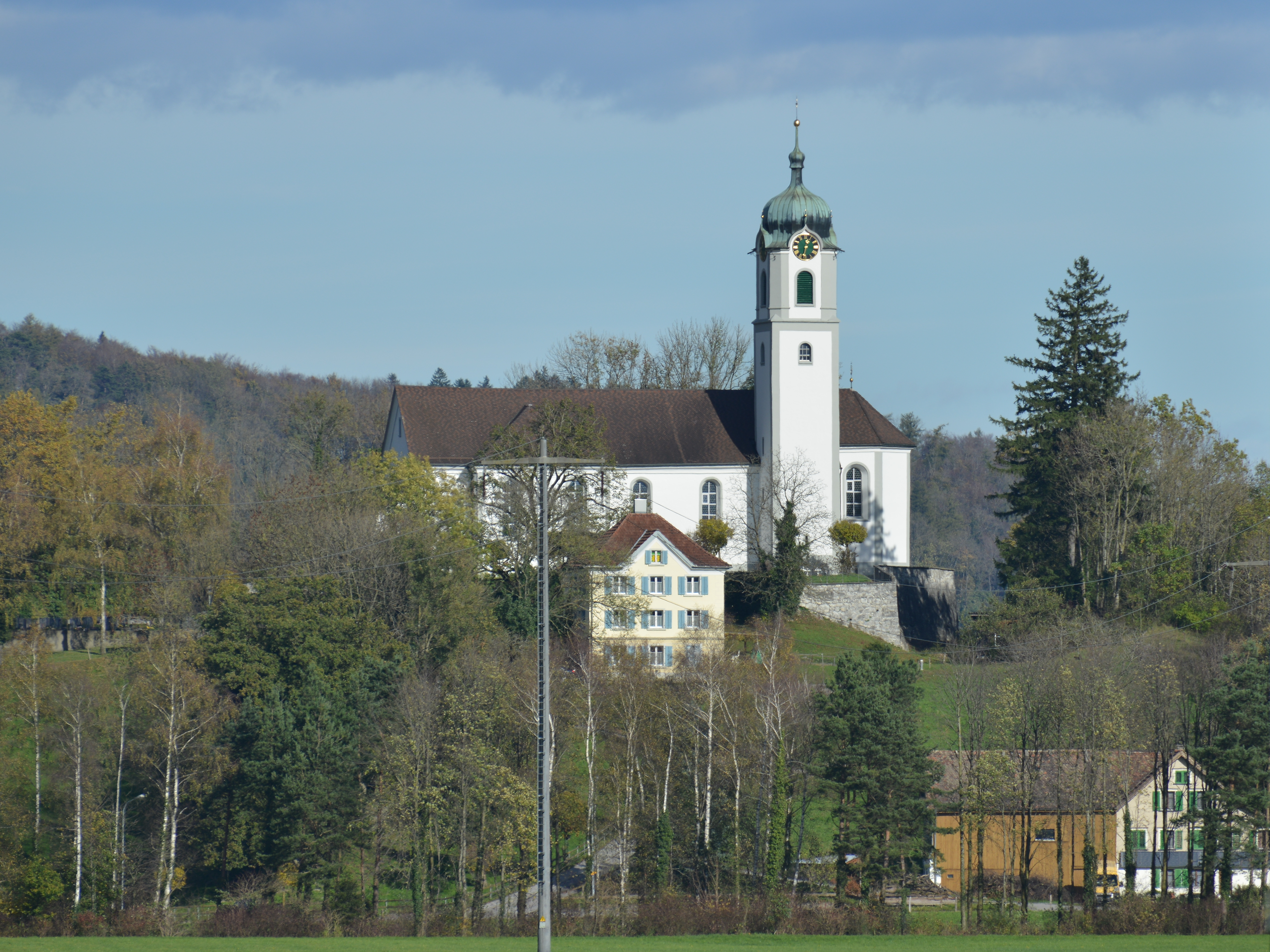 Katholische Kirche St. Valentin (1734) mit Pfarrhaus auf dem St. Valentinsberg in Rüthi.